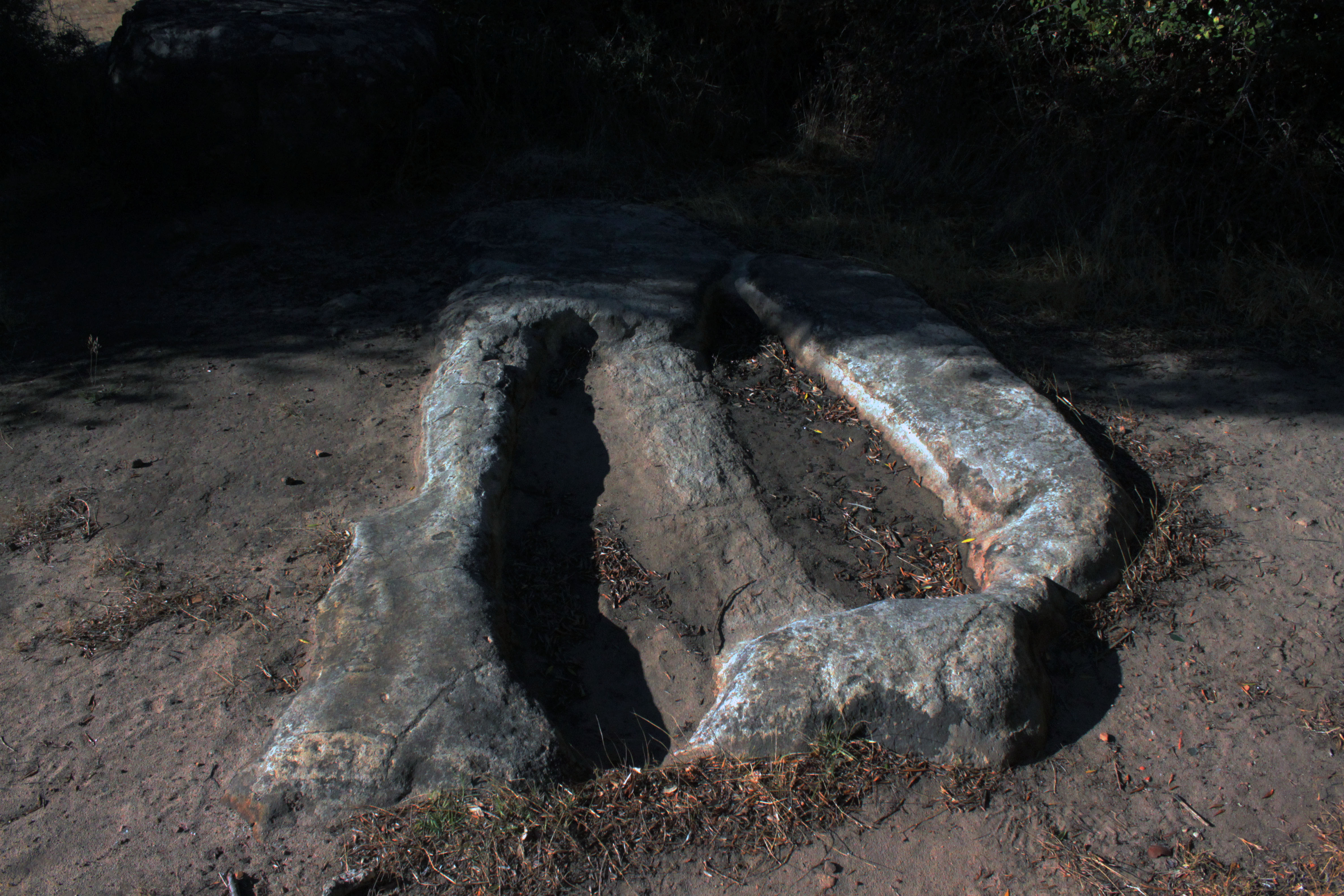 Tumbas excavadas en la roca de cronología no determinada en el paraje denominado Llano de las tumbas en el término municipal de Algeciras, Andalucía, España.